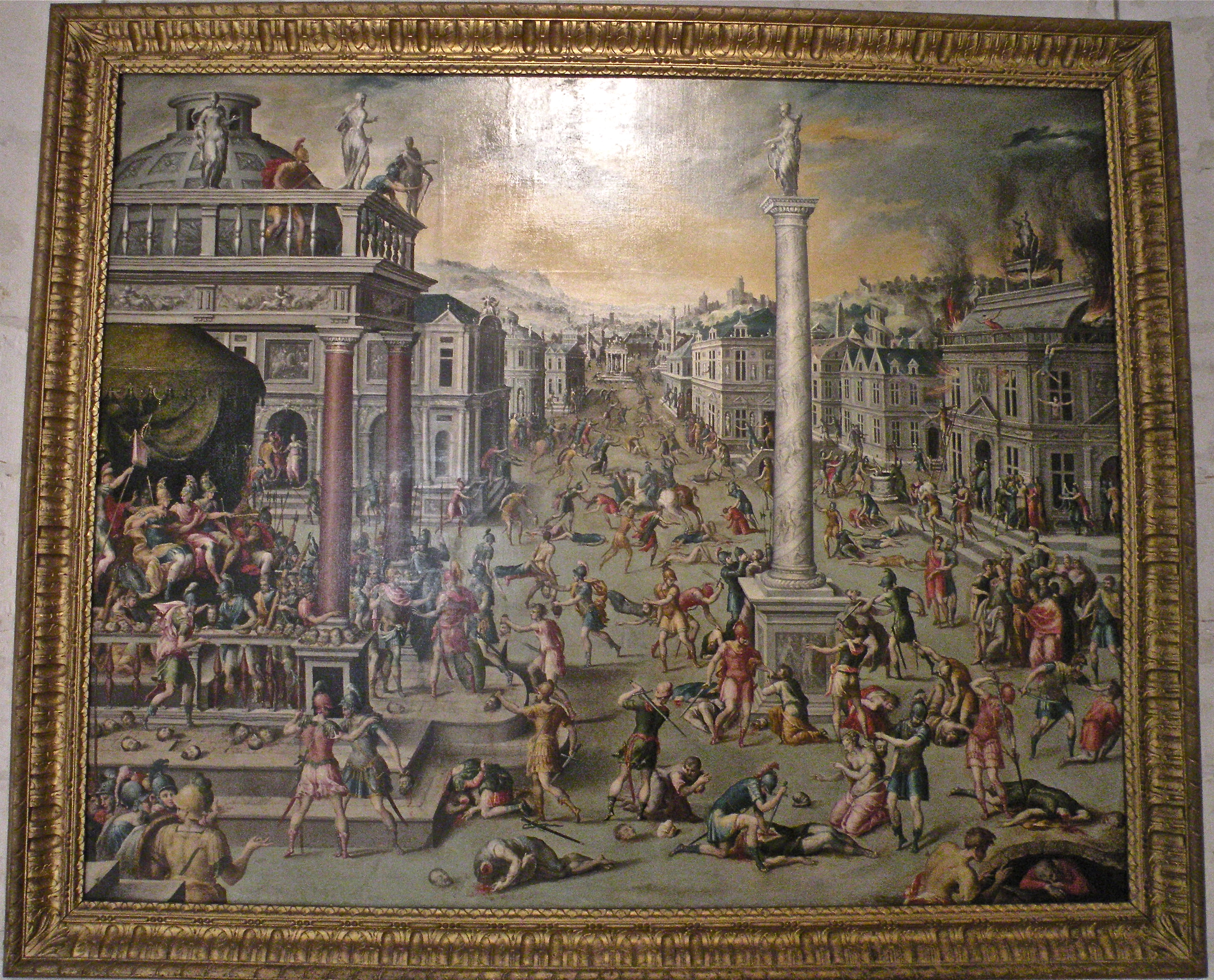 Le Massacre des Triumvirs (1562) est un tableau du peintre français maniériste Antoine Caron. Il se trouve depuis 1945 dans les collections du musée de Beauvais.